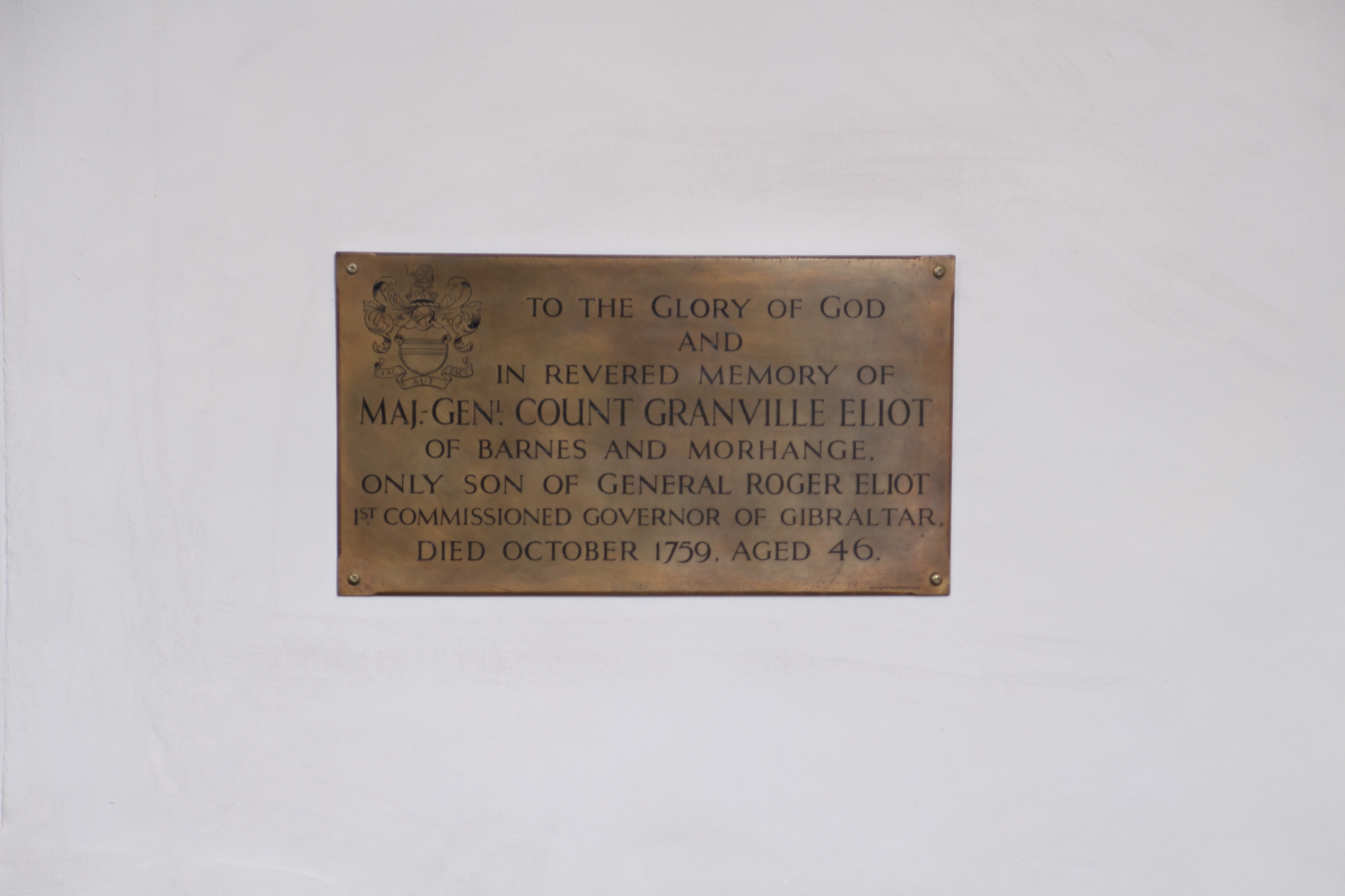 Siehe Bild und Dateiname